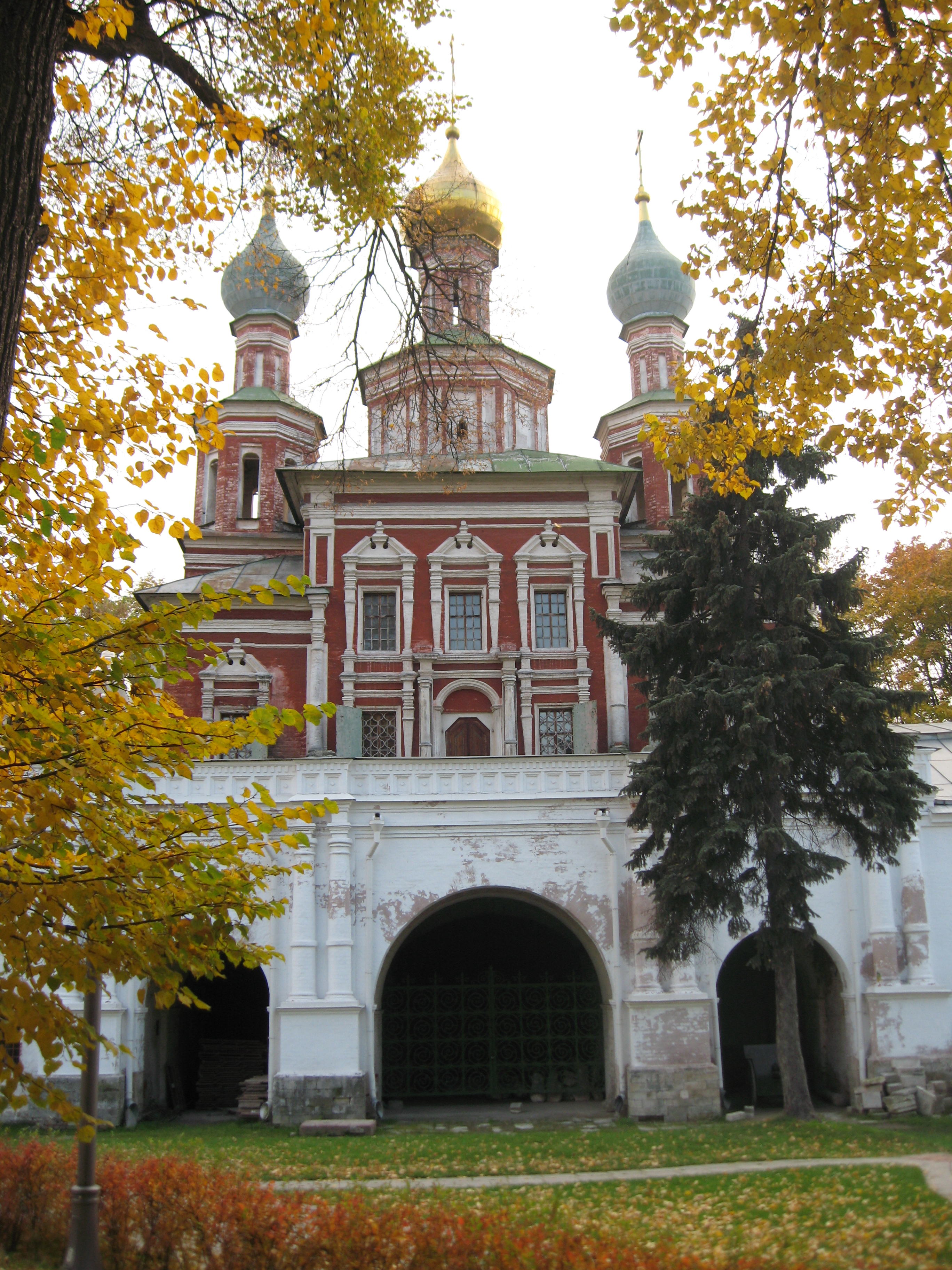 Монастырь Новодевичий (Москва и Московская область, Москва, Новодевичий пр., 1)